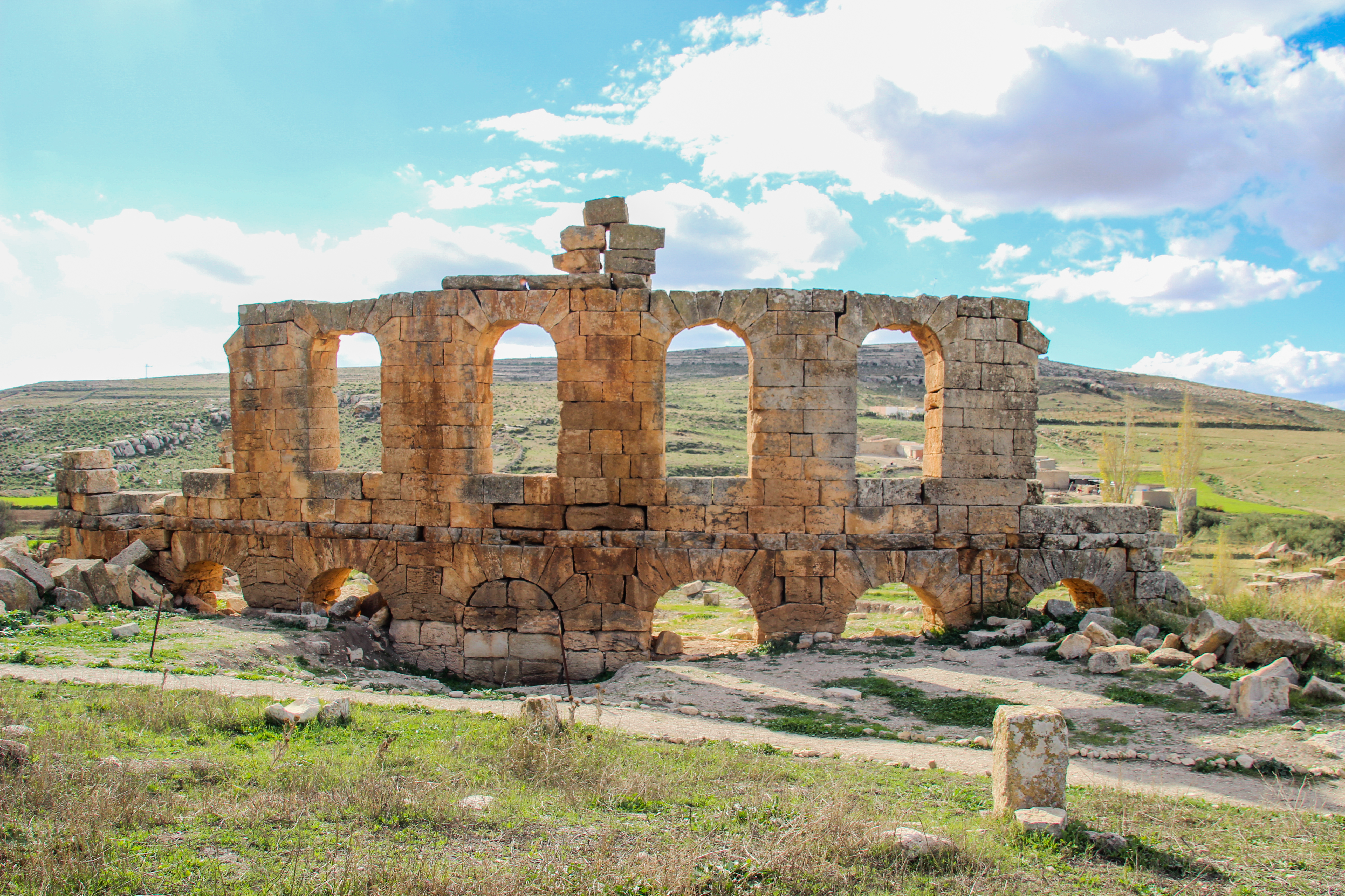 Dahmeni - Elkef